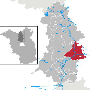 Liebenwalde in Brandenburg (Country) - District Oberhavel